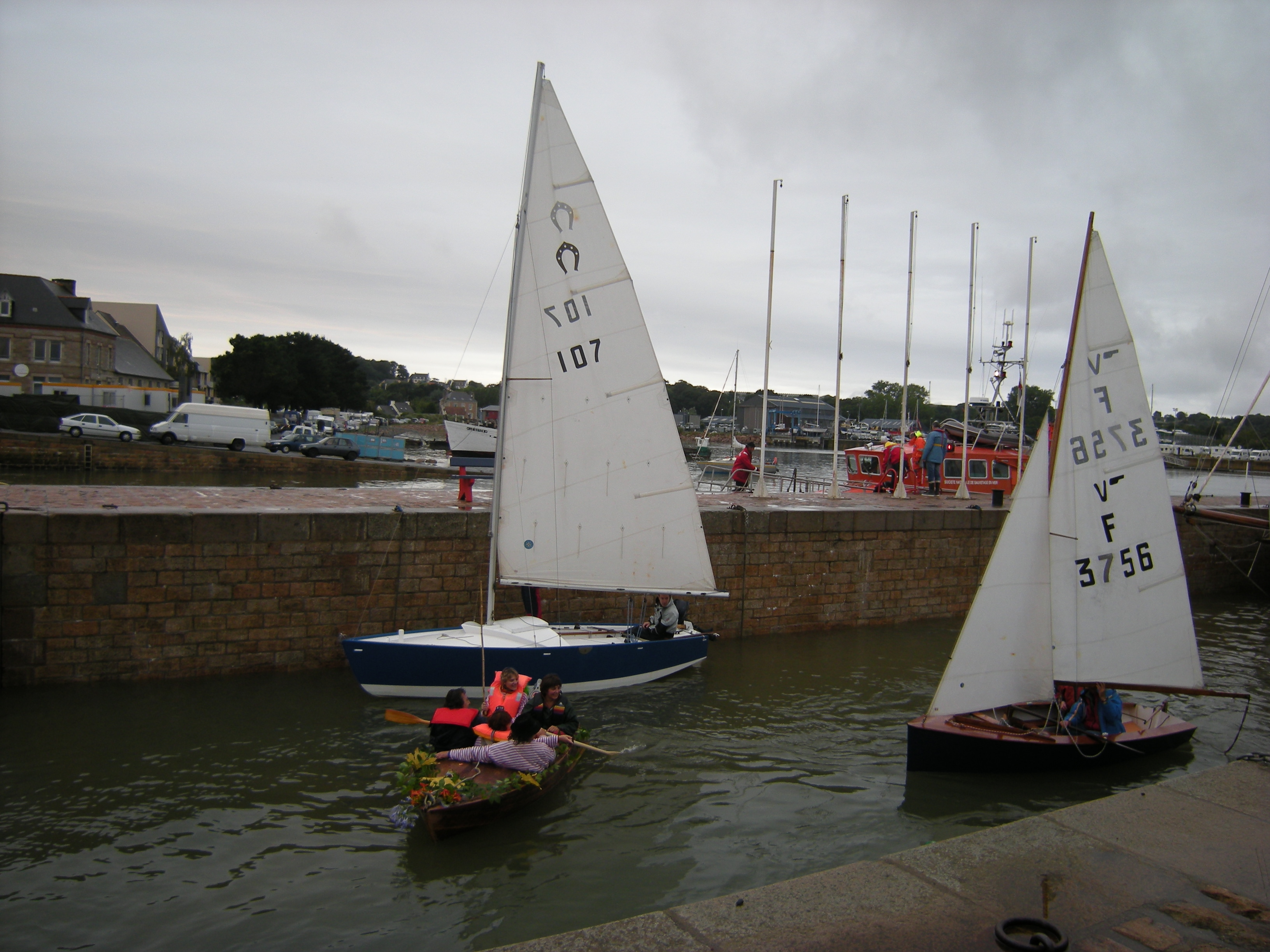 Vaurien et Cavale passant dans le sas des écluses de Paimpol pour rejoindre les vieux gréements du Festival du chant de marin de 2009